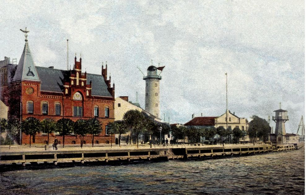 Достопримечательности города Пиллау (Балтийск, Калиниградская область)